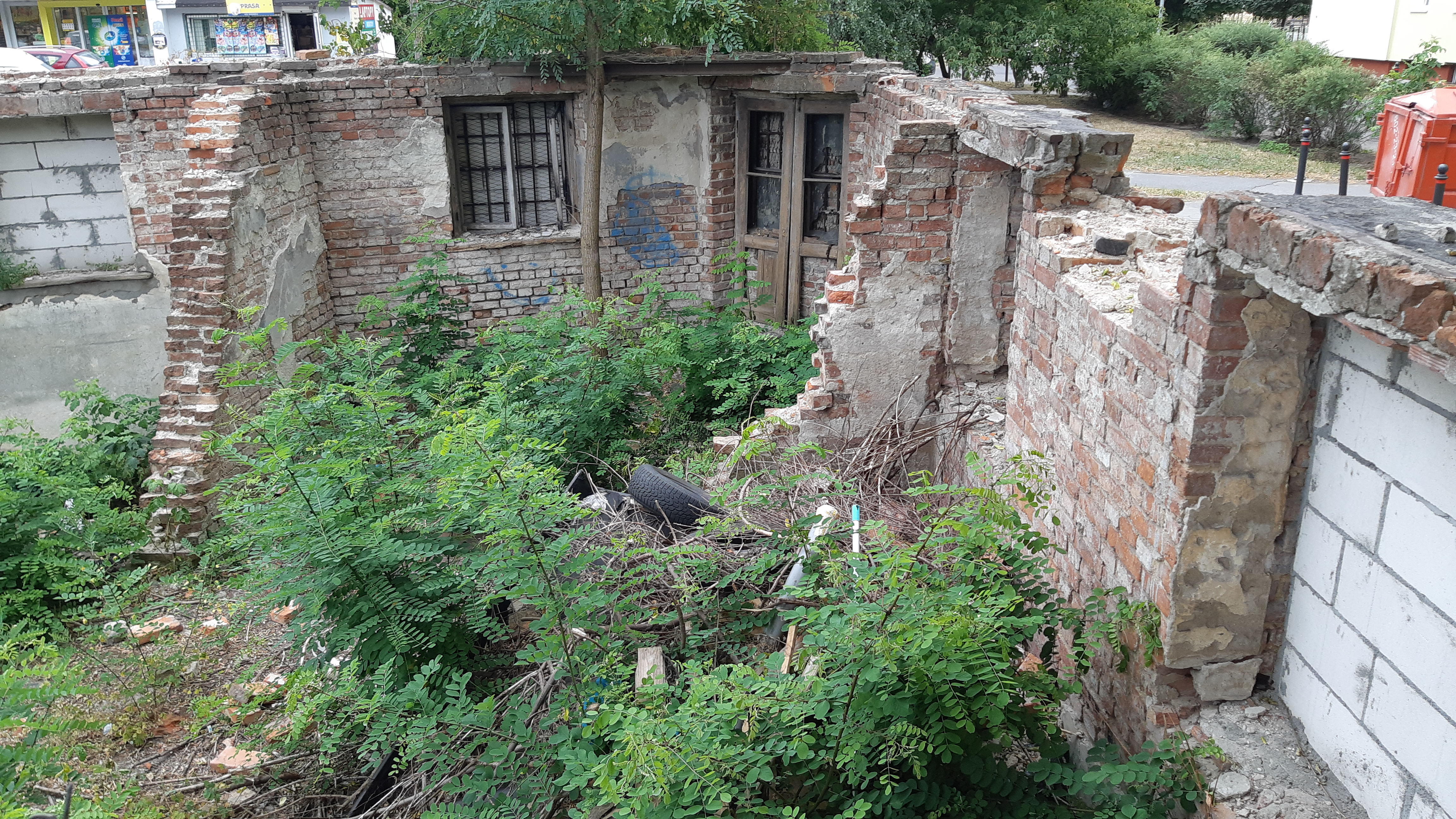 קיר שנותר מהבית האדום שהיה חלק מחוות ההכשרה בגרוכוב שלייד וורשה, פולין